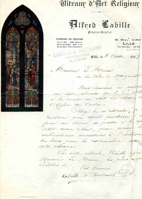 Alfred Labille - papiers entête